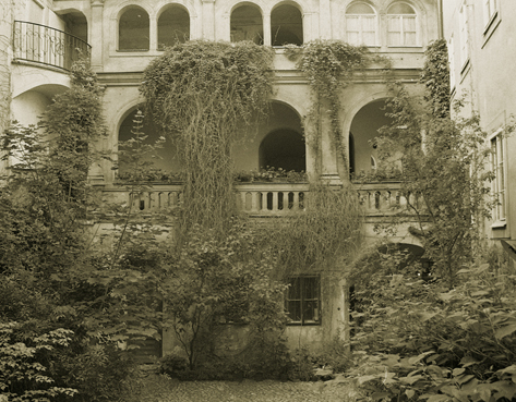 Gelatine silver print. Bromolejová fotografie.